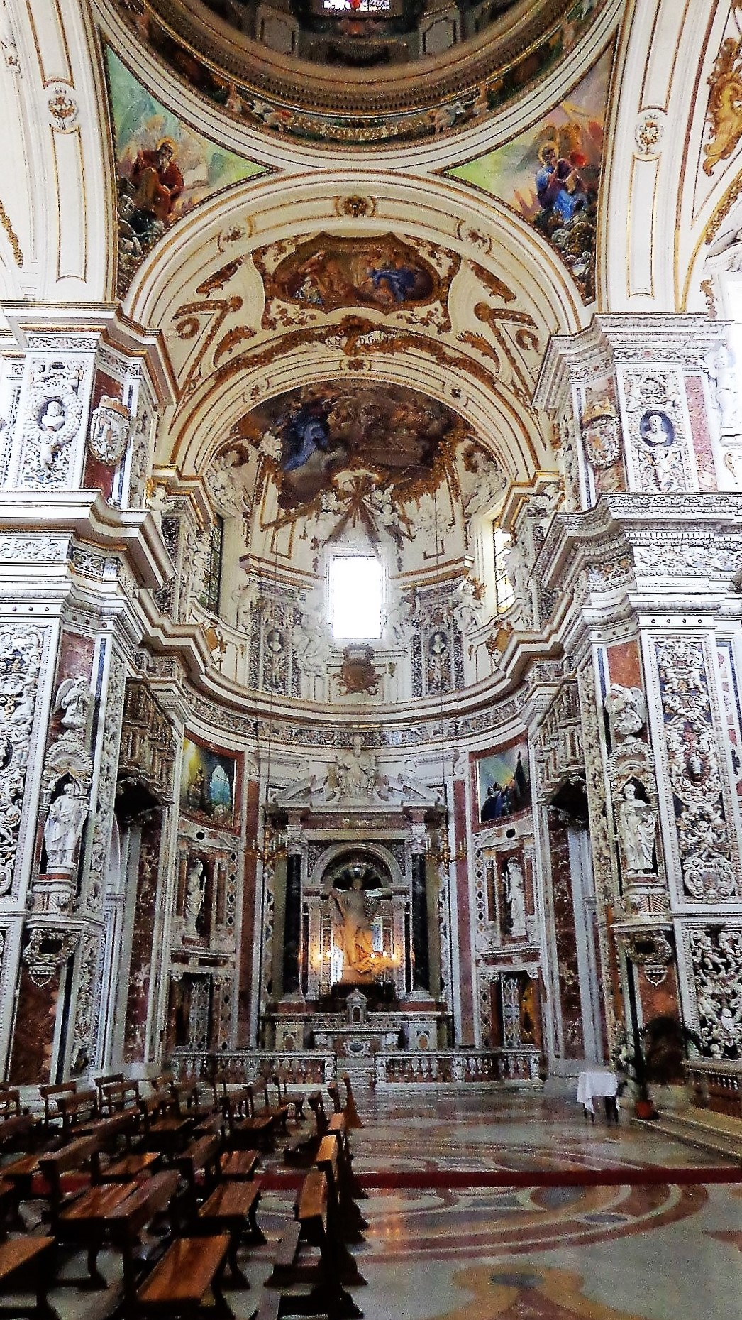 Interno chiesa